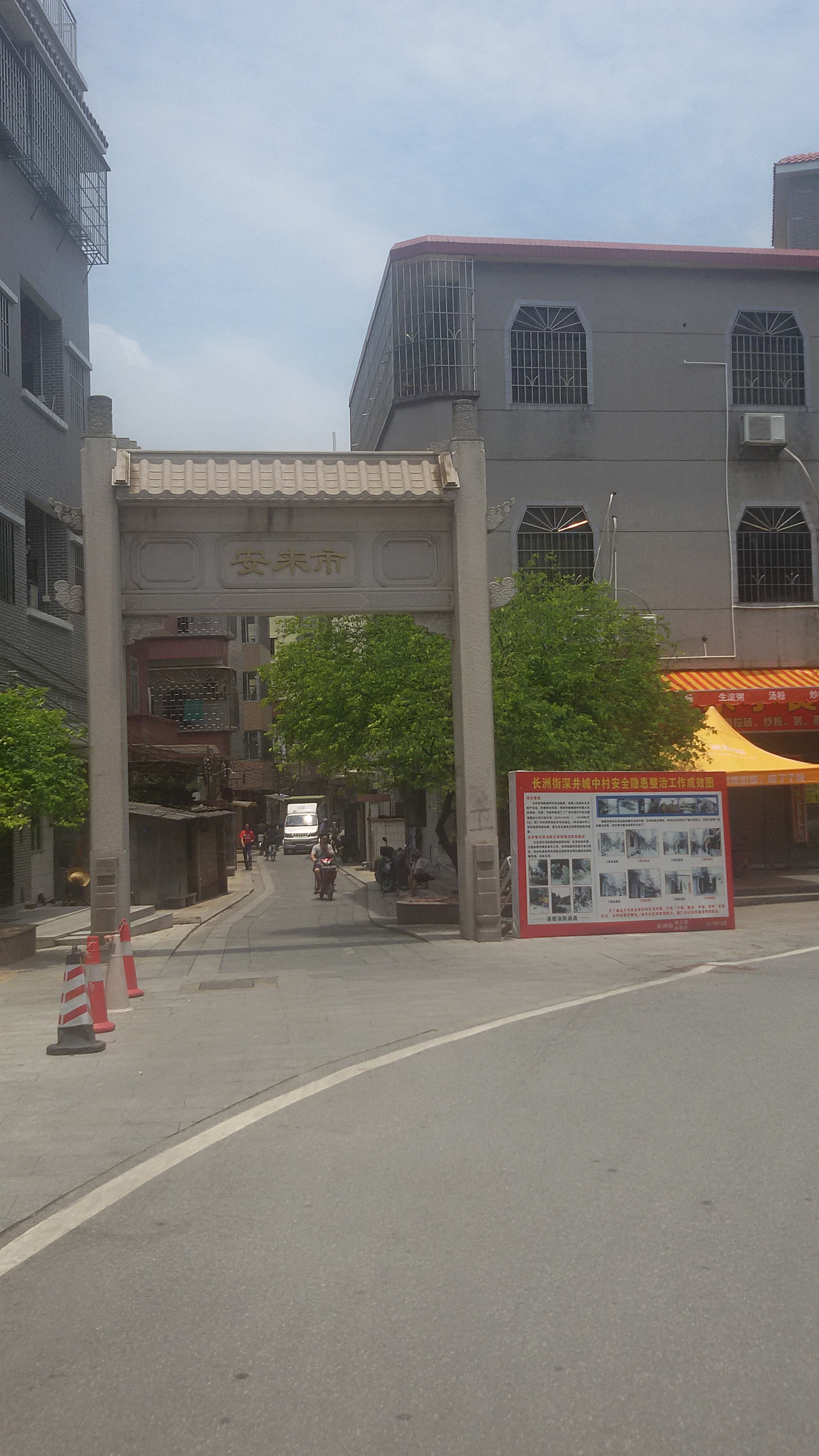 粵語: 安來市舊址